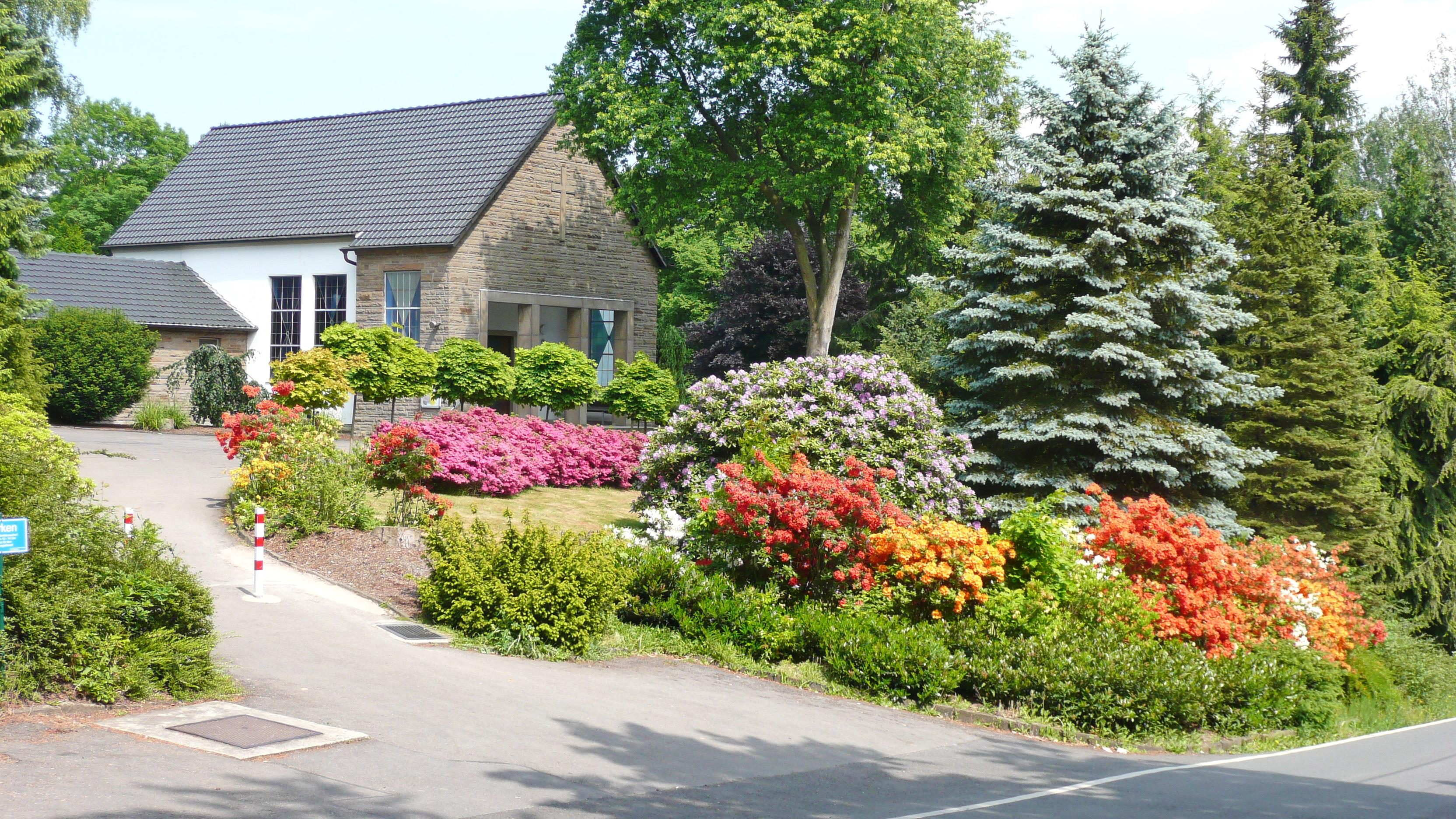 Friedhofskapelle Wengern